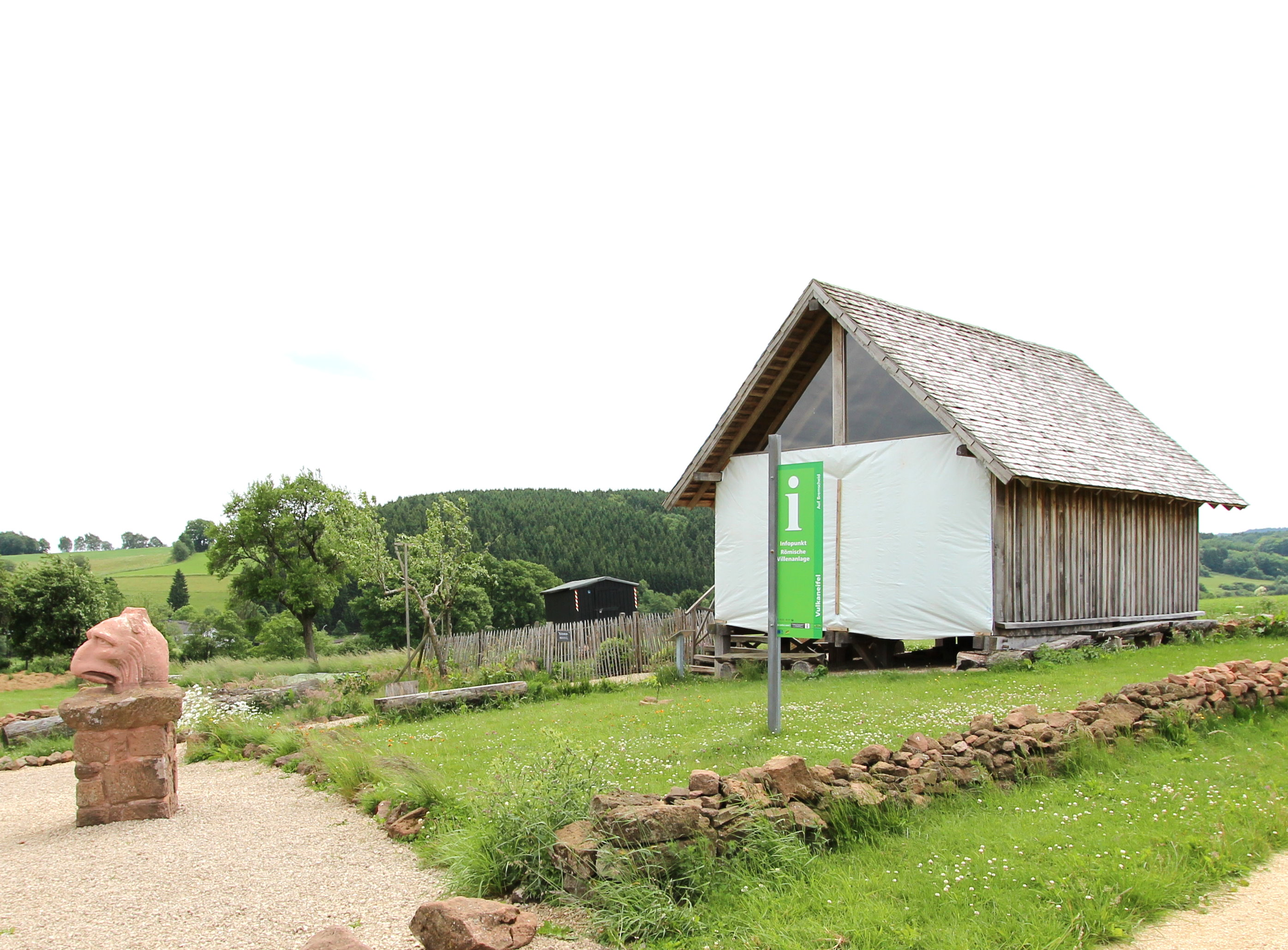 54597 Duppach-Weiermühle. Mit der Nekropole von Duppach-Weiermühle wurde erstmals ein monumental ausgestaltetes Gräberfeld einer römischen Villenanlage in einer Mittelgebirgsregion der Nordwestprovinzen des Römischen Reiches vollständig erforscht. Die Villenanlage war vom 1. bis an den Beginn des 5. Jahrhunderts n. Chr. kontinuierlich besiedelt. Aufnahme des Infopoint-Speichergebäudes von 2017.